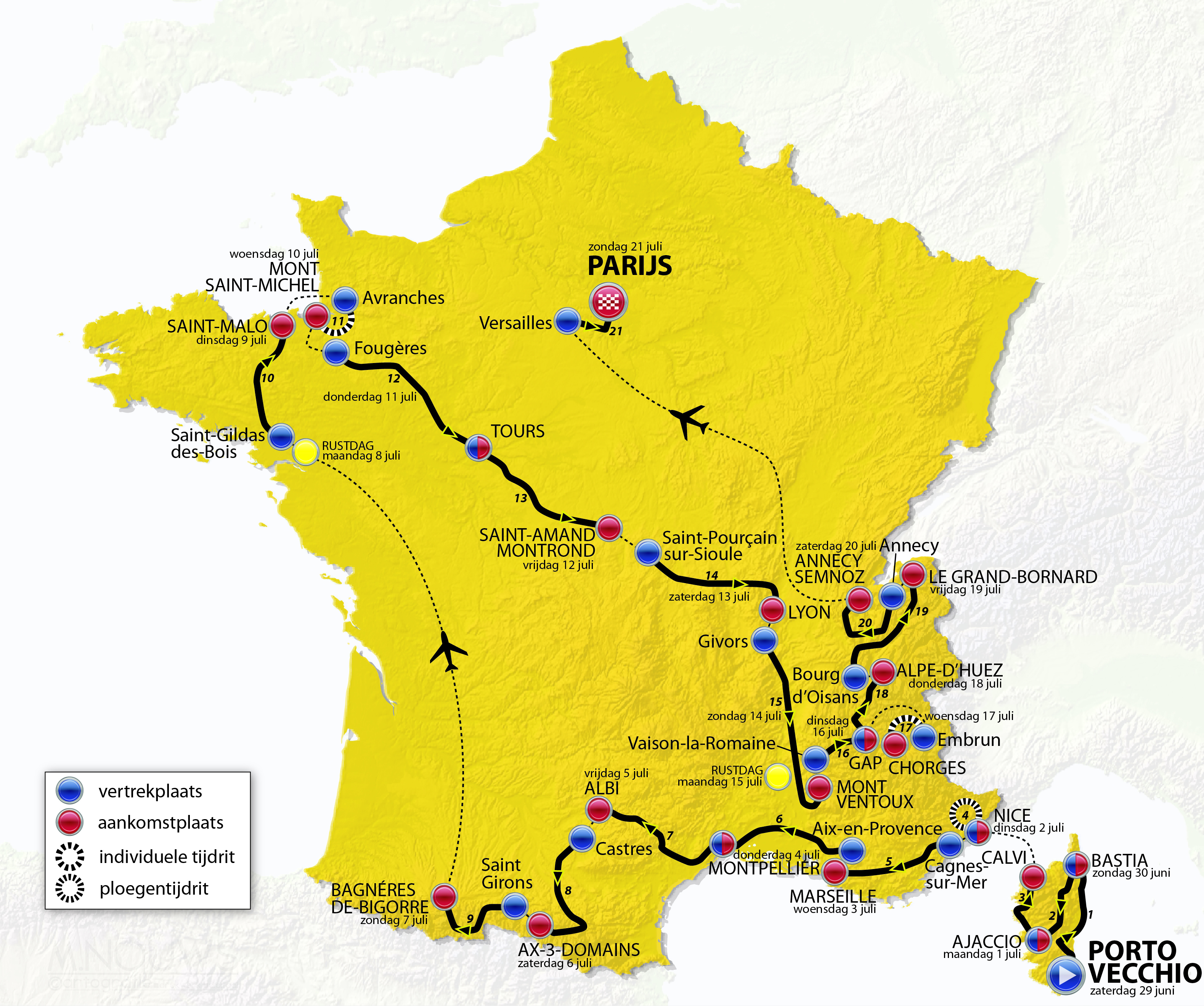 Parcours van de 100ste editie van de Tour de France in 2013